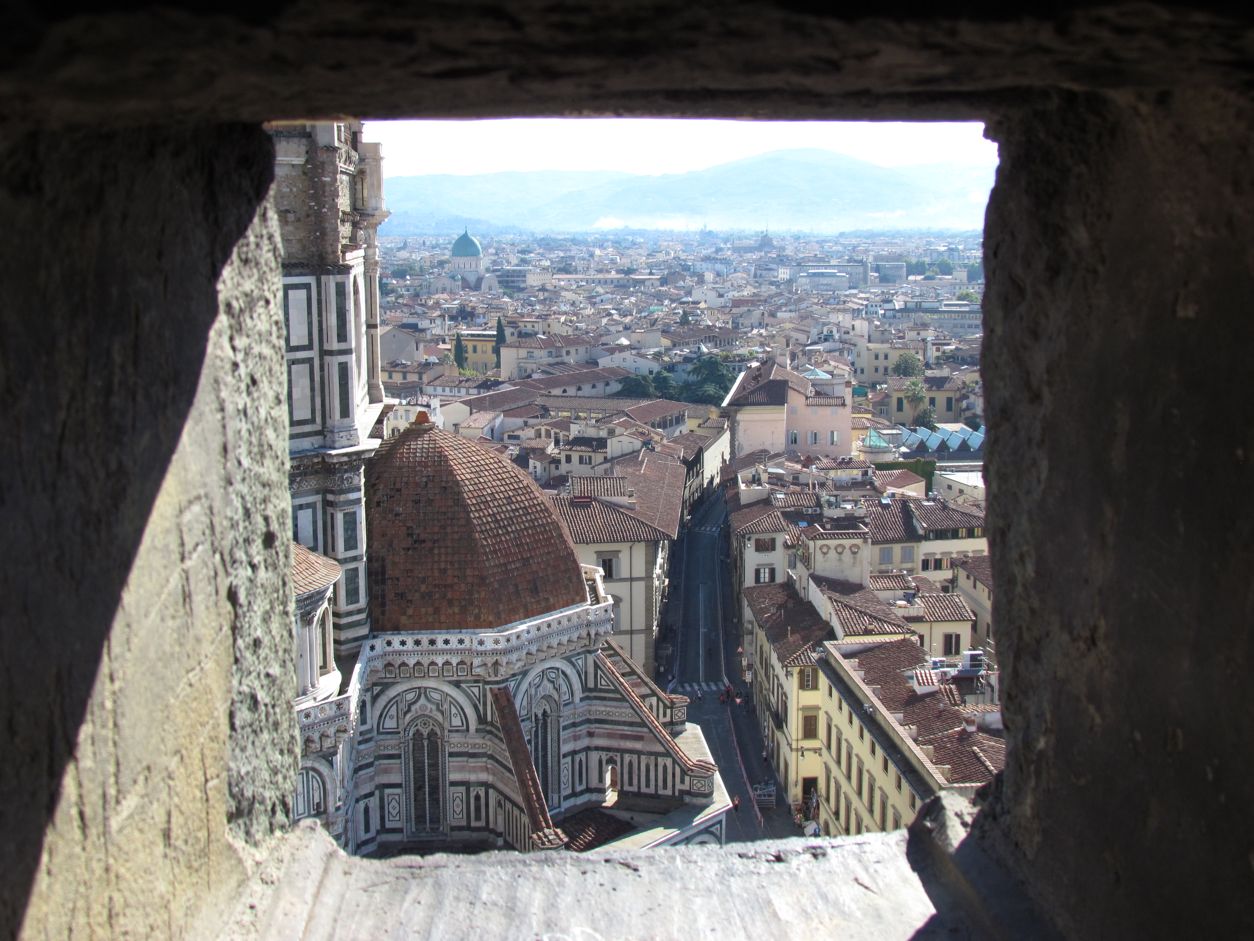 Vista desde el Campanario de Giotto, Florencia